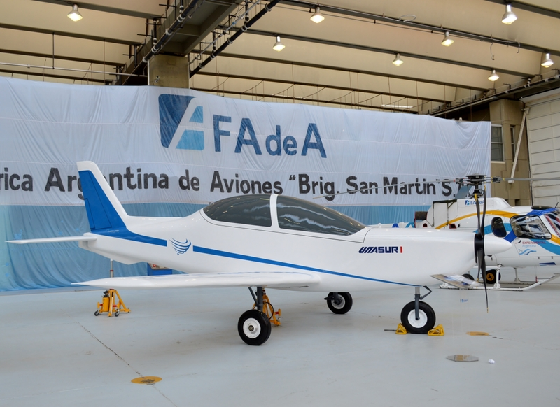 Maqueta del avion de entrenamiento IA 73/ UNASUR I